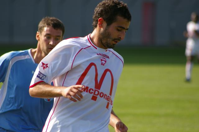 Zerka lors d'un match de CFA